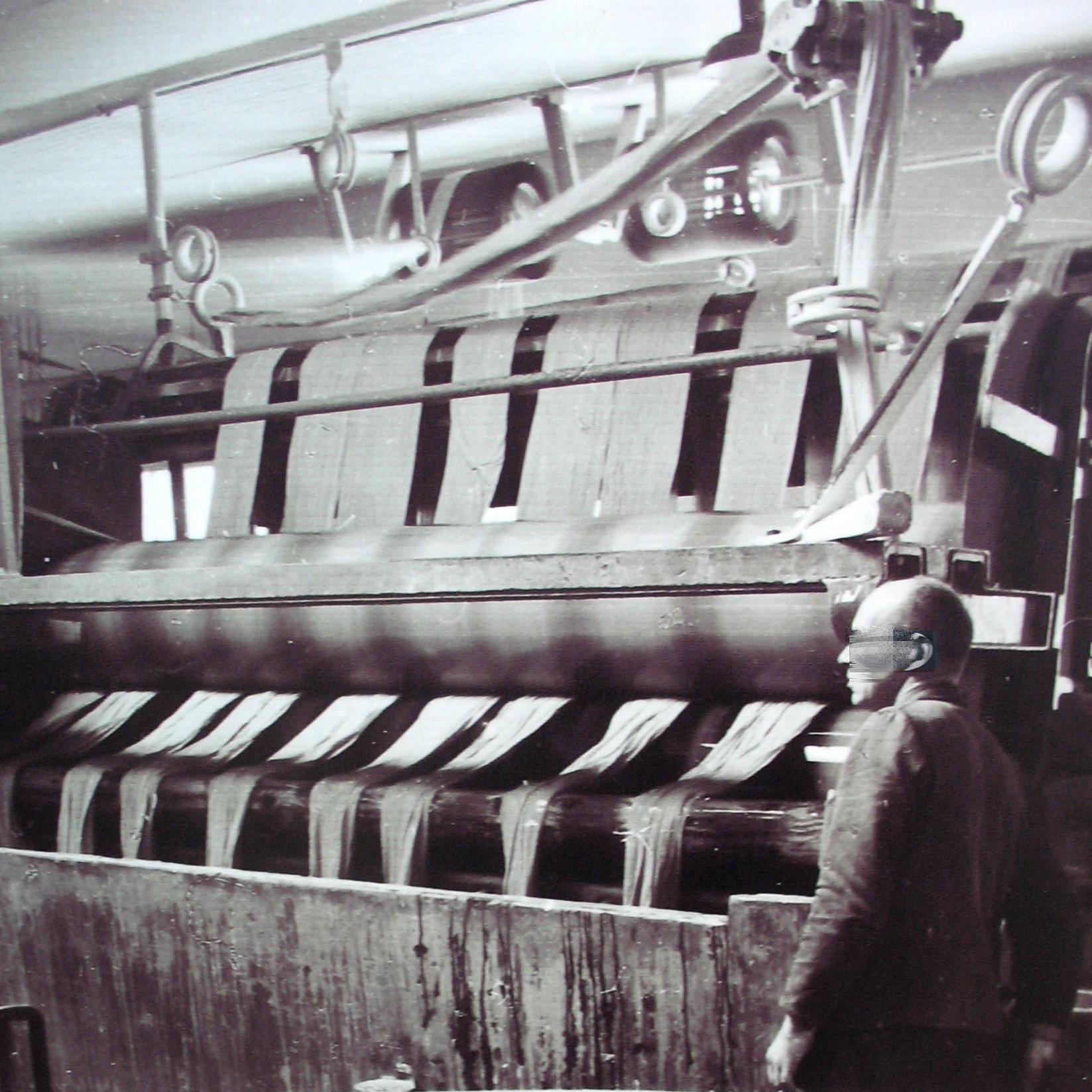 Haspelkufe